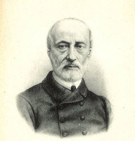 Giuseppe Mazzini